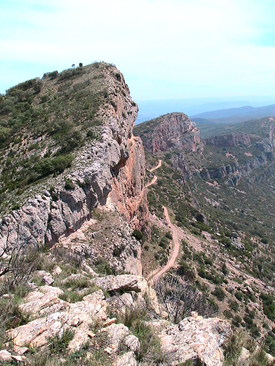 La Pala Alta, cim més alt del Mont-roig, a Camarasa (Noguera - Catalunya)